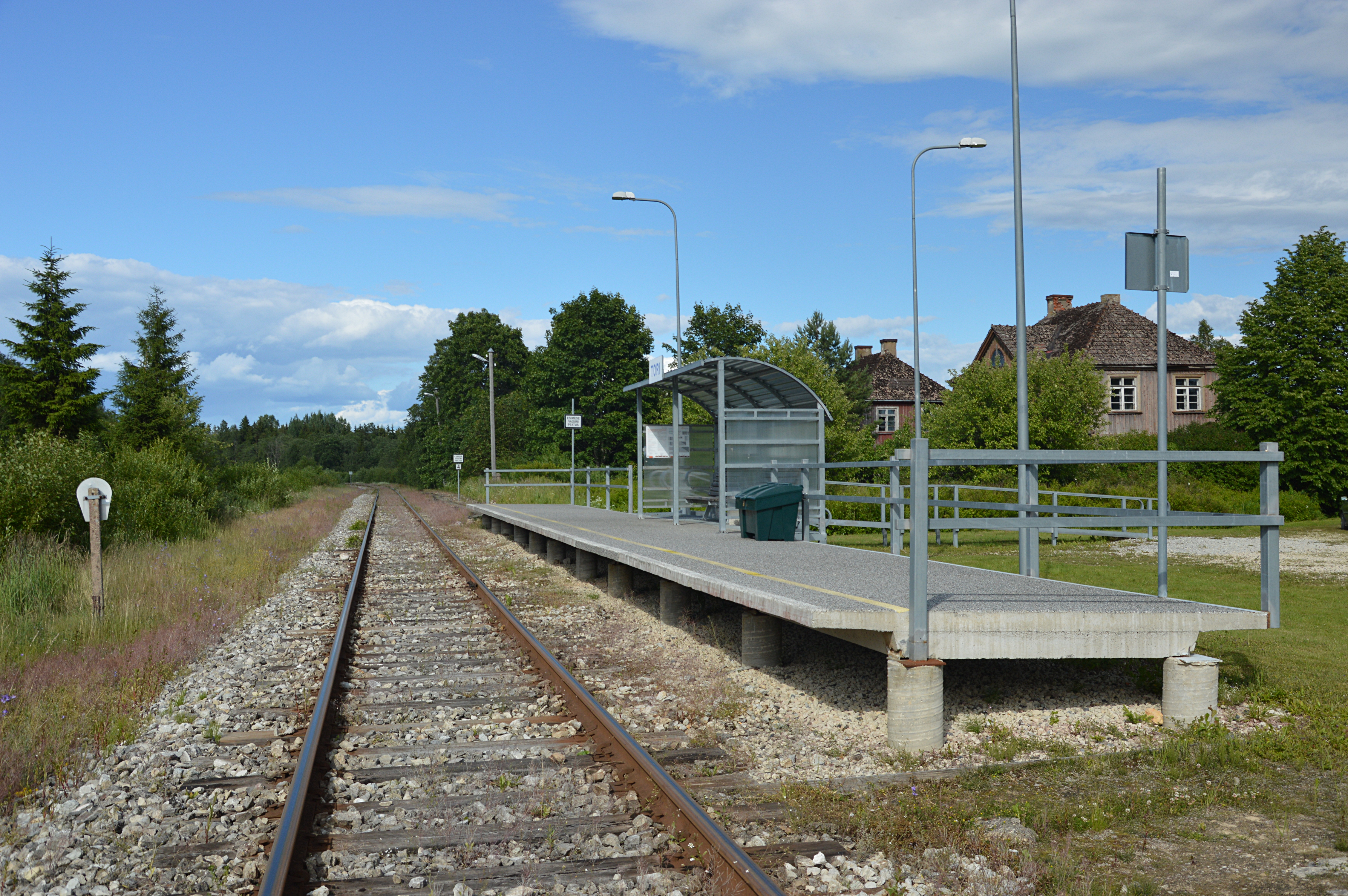 Tori raudteepeatus